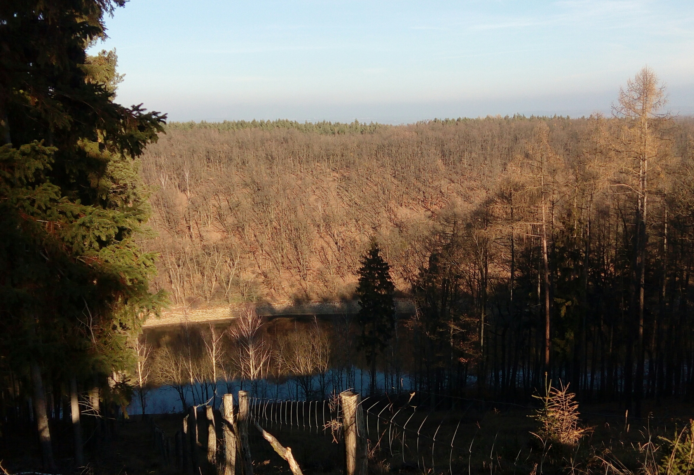 PP Zmijiště - pohled na lokalitu z protější strany údolí Únanovky